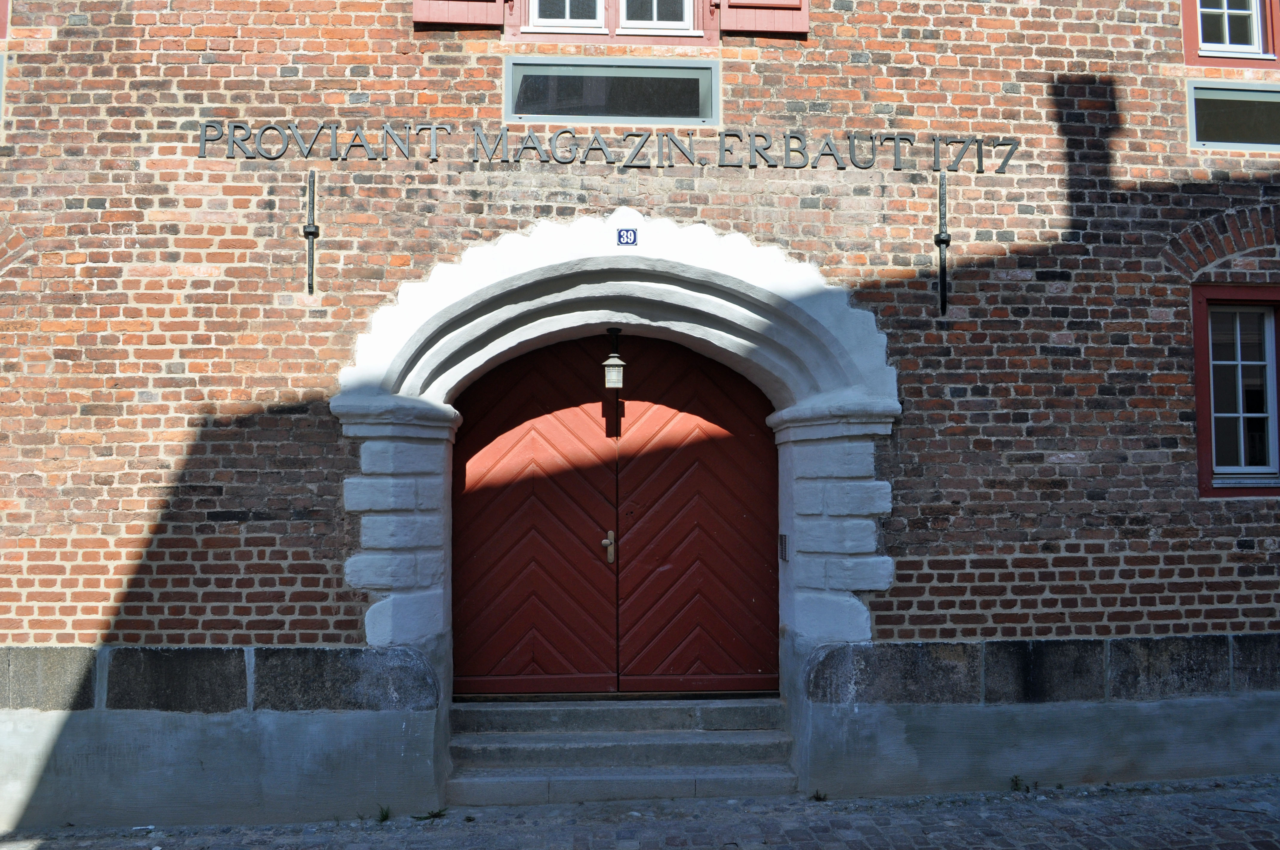 Gebäude bzw. Gebäudedetail in Stralsund. Straße und Hausnummer siehe Dateiname.